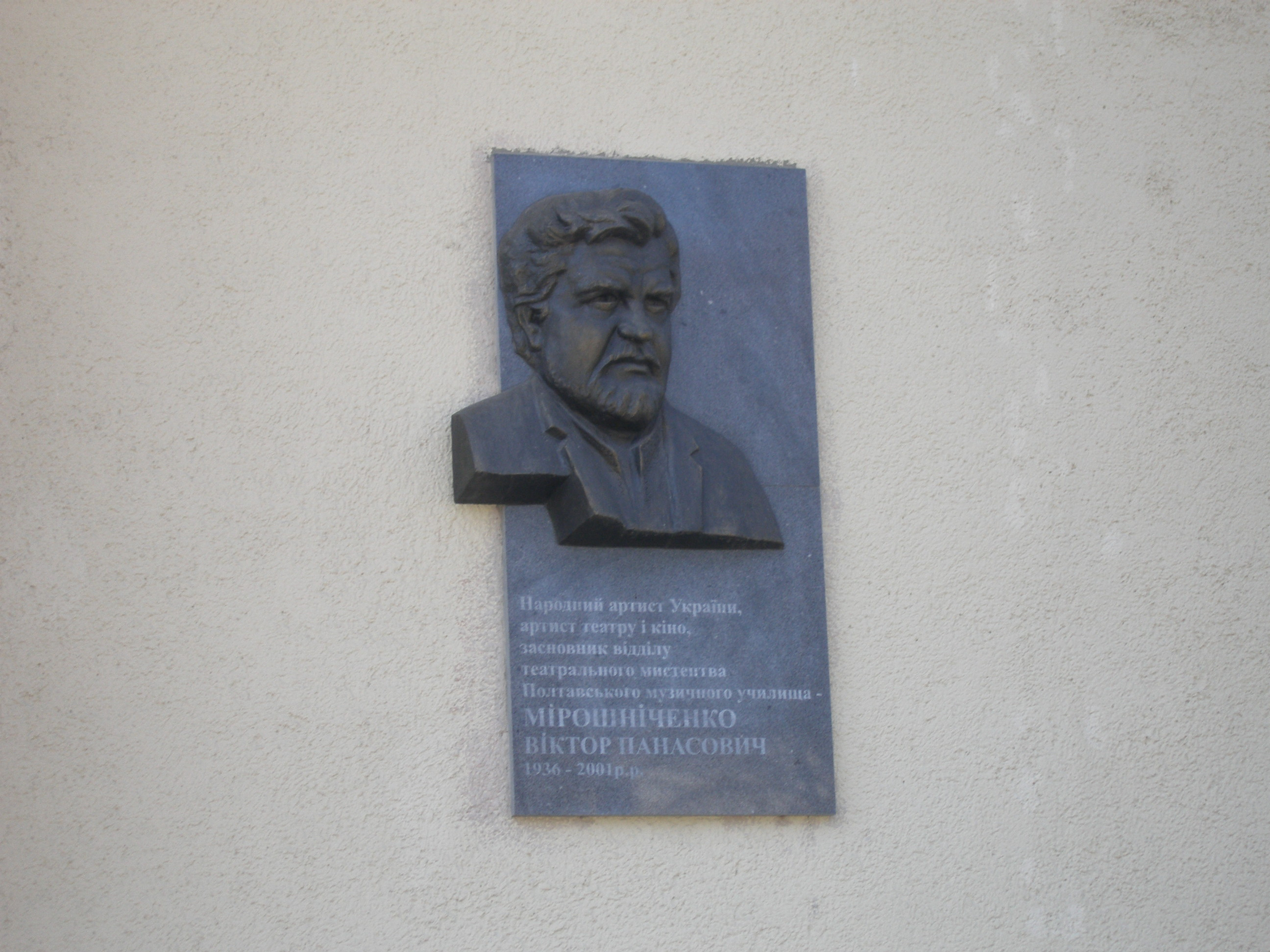 Народний артист України, артист театру і кіно Мірошниченко В.П.